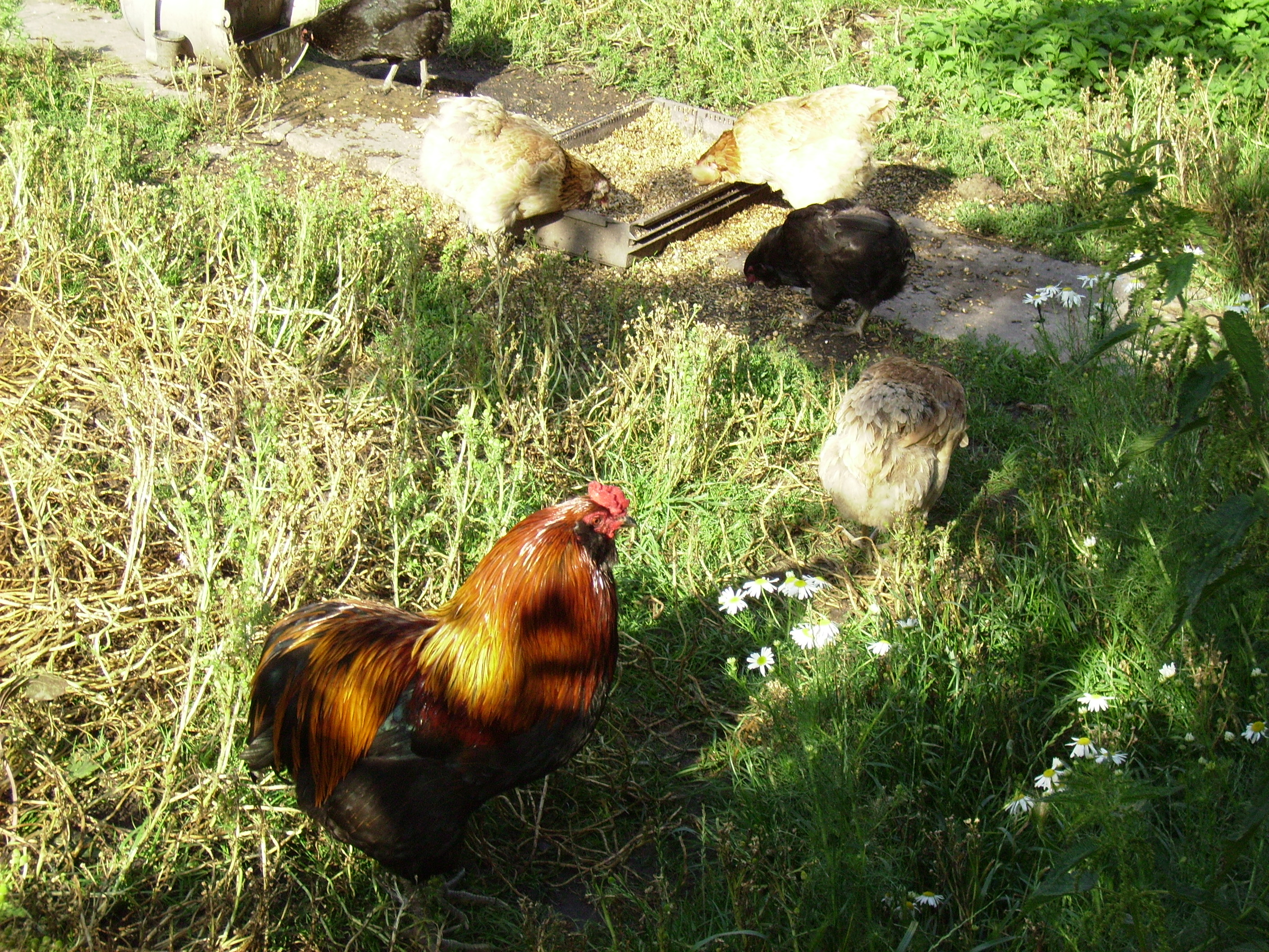 Araucana-Hühner